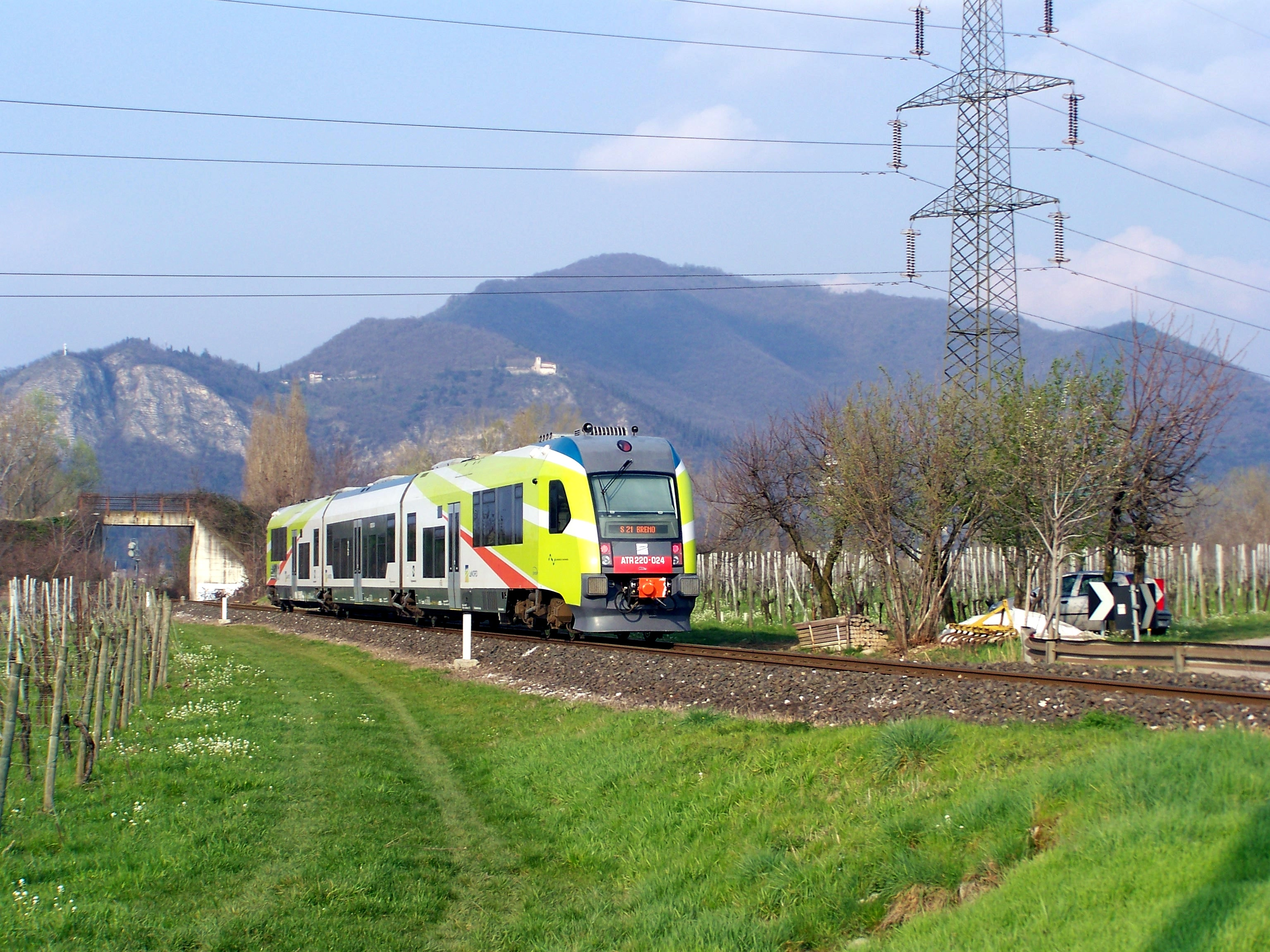 L'ATR 220.024 in uscita dalla stazione di Borgonato-Adro, mentre espleta il R 1064 Brescia-Breno.